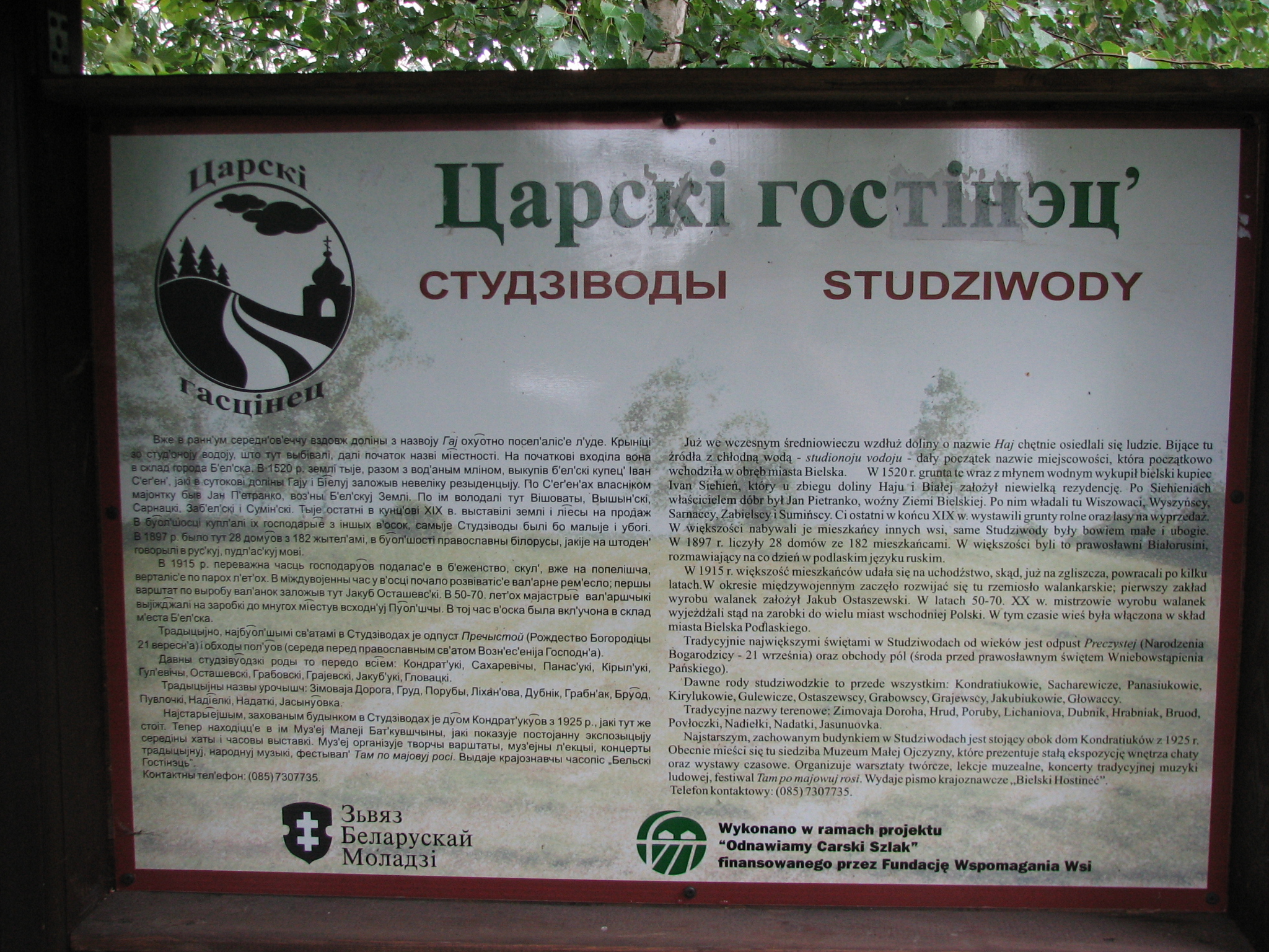 Беларуская (тарашкевіца): Турыстычная таблічка ў Студзіводах на мове беларусаў Падляшша і польскай мове